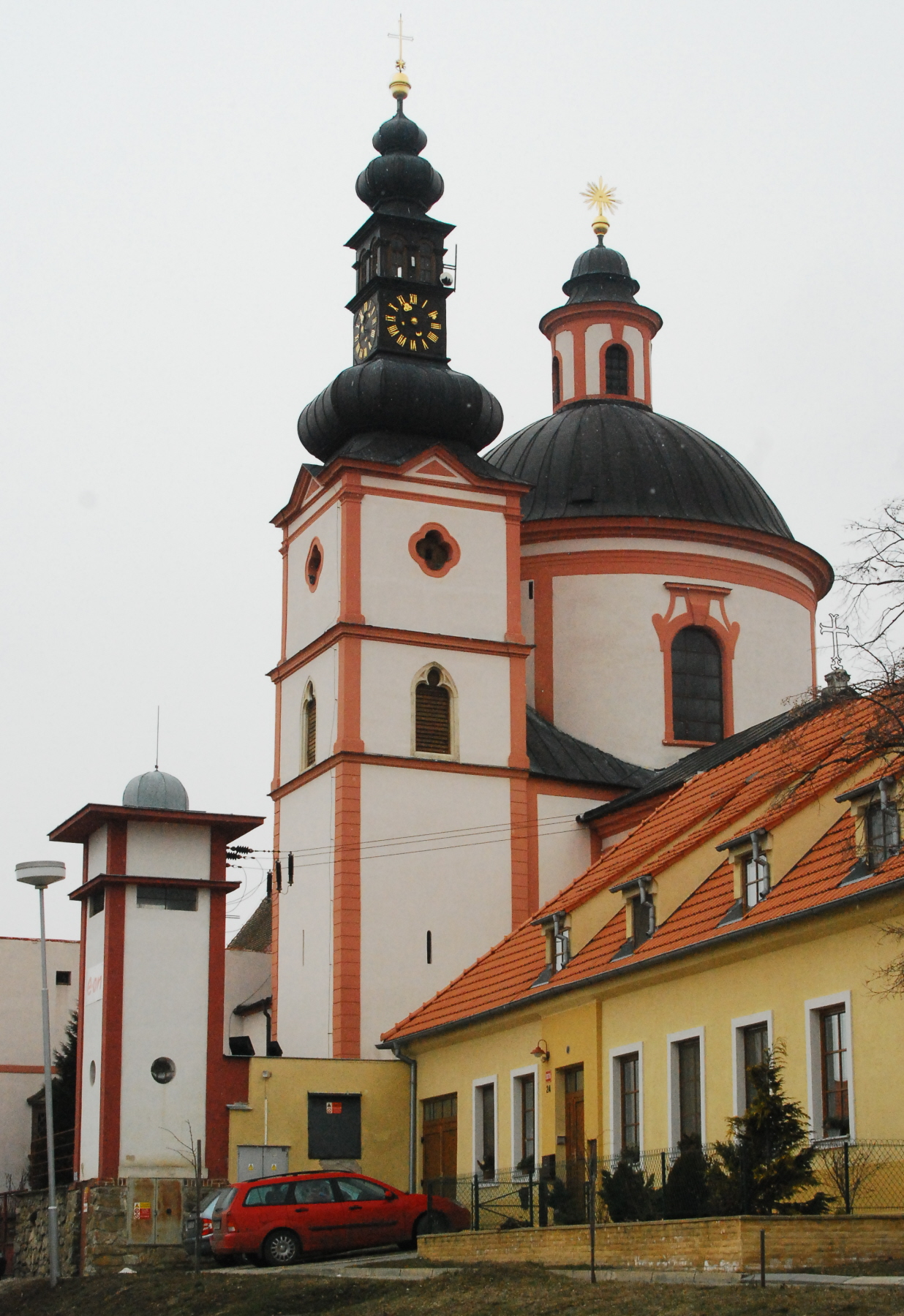 Die Propstei in Hradiste (Znojmo) auf dem Pöltenberg.